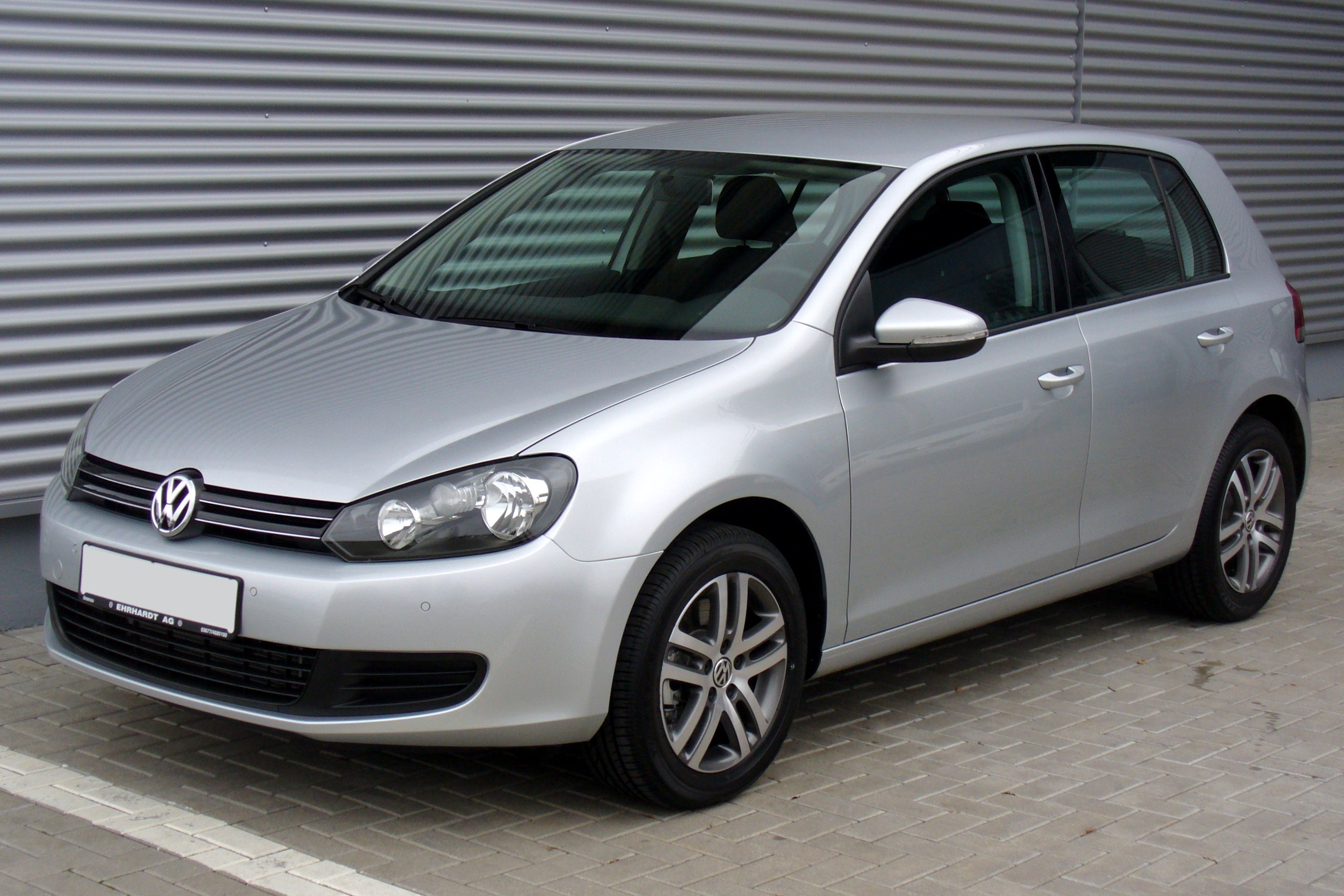 VW Golf VI